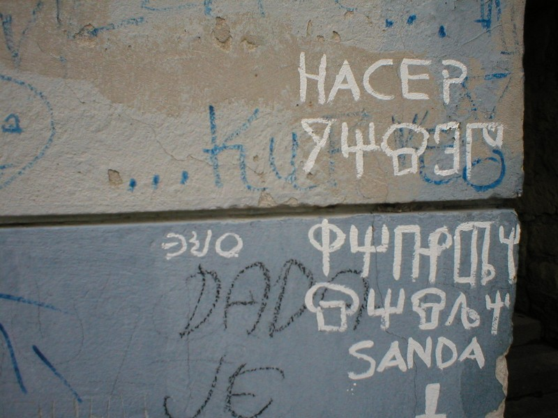 Glagolic graffiti in Zagreb, Croatia